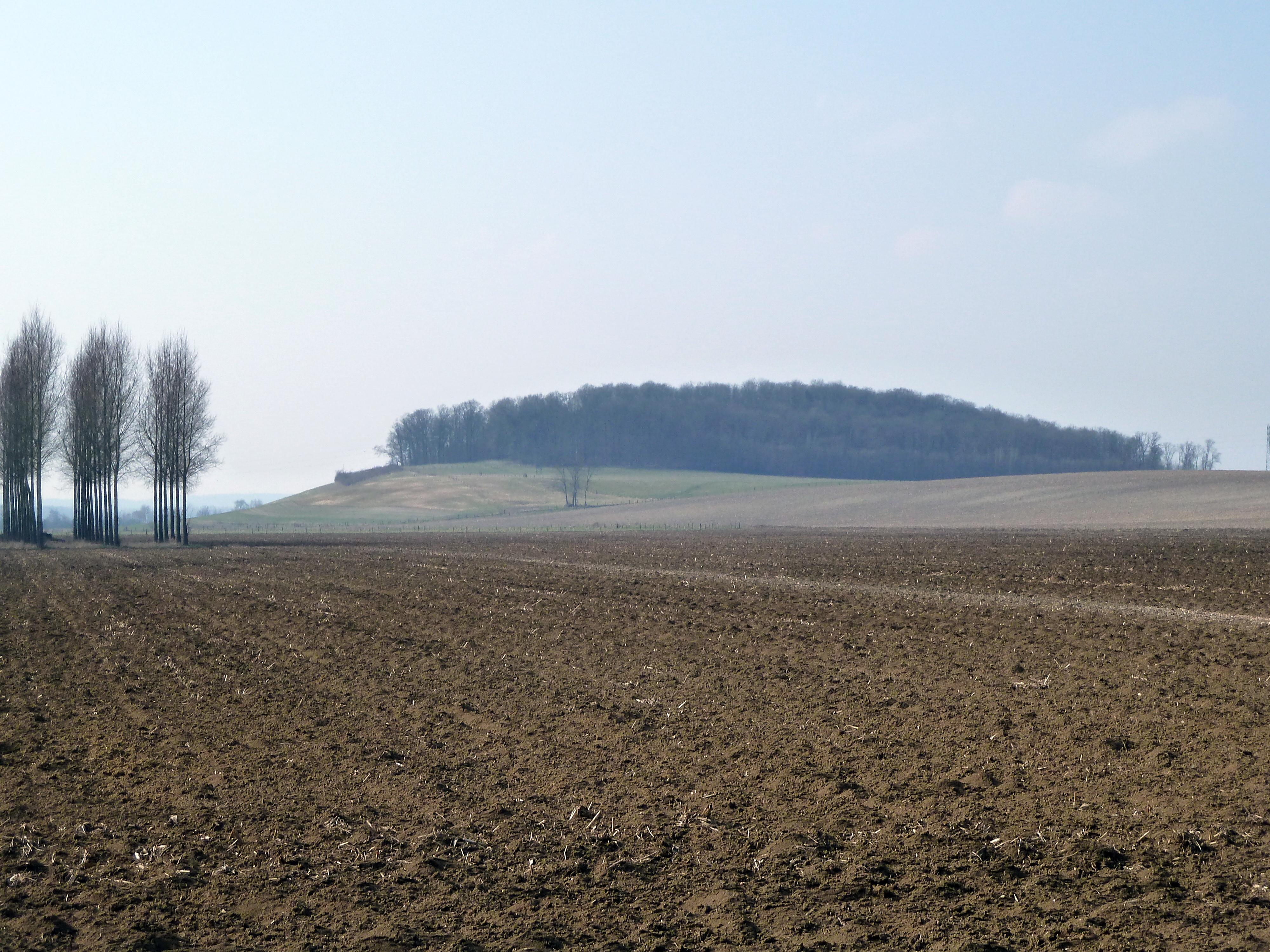 Nettancourt (55 Meuse) - La butte d'Huppemont (altitude 181 m) sur laquelle se trouvait autrefois un camp militaire romain. Huppémont était, au moyen âge, un village formant commune et paroisse.